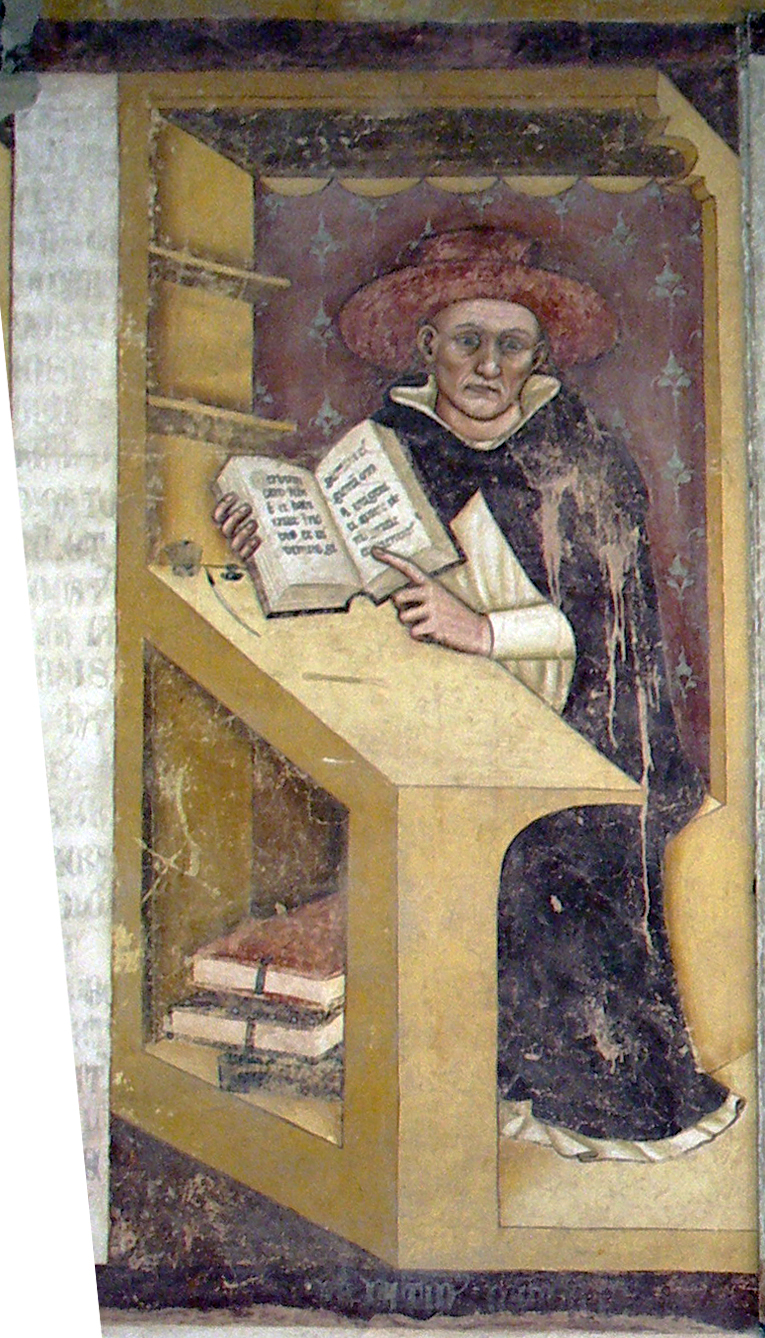 Latino Malabranca, serie dei Quaranta domenicani illustri, ex convento di San Niccolò, Sala del Capitolo, Treviso, 1352 (altezza di ciascun ritratto 150 cm circa)